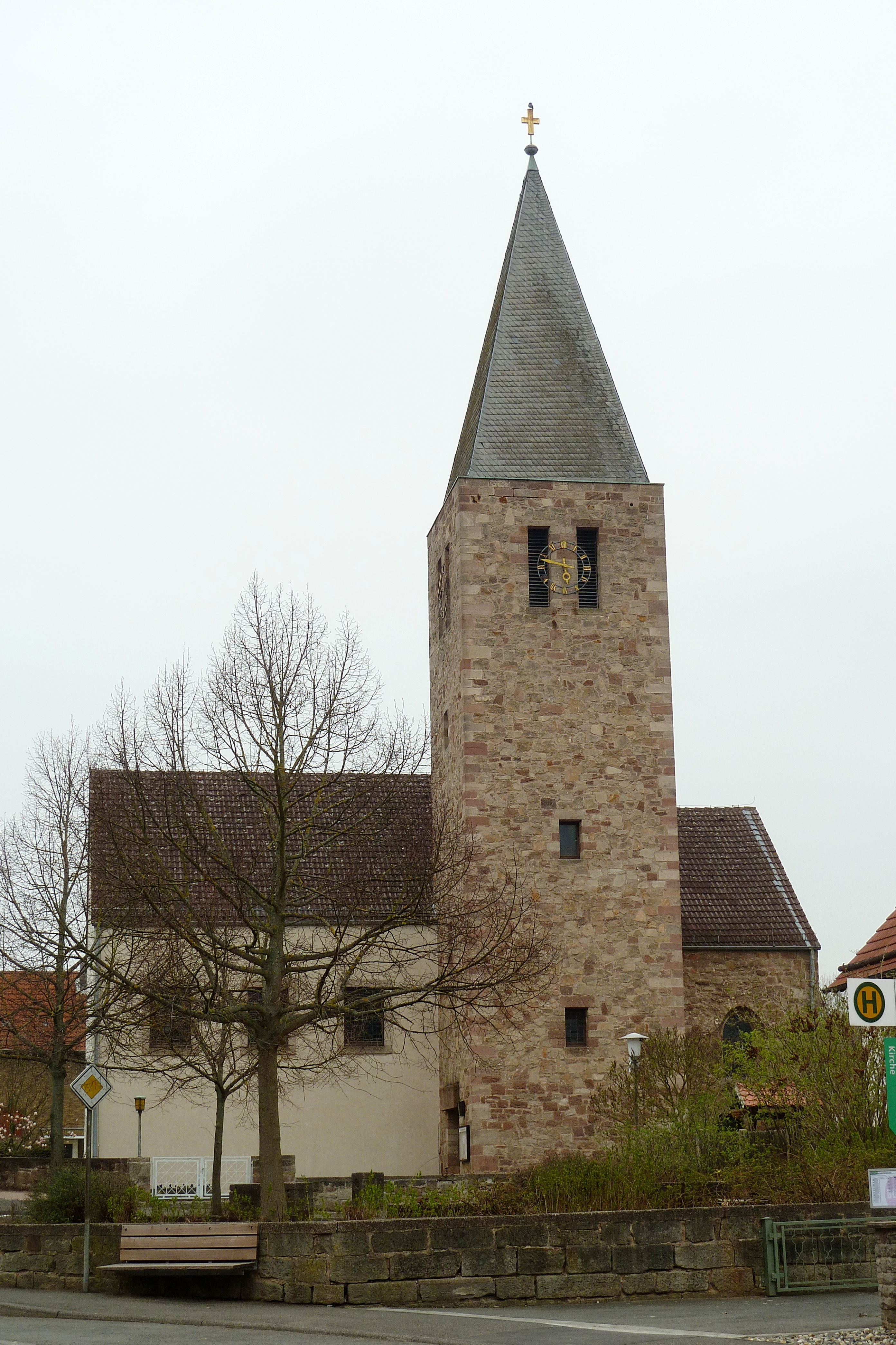 Ev. Kirche in Ermschwerd, Stadt Witzenhausen, Nordhessen. Der rechts neben dem Turm sichtbare Teil ist alt und enthält viele spätgotische Bestandteile, der größte Teil entstammt einem Umbau aus den 1960er Jahren